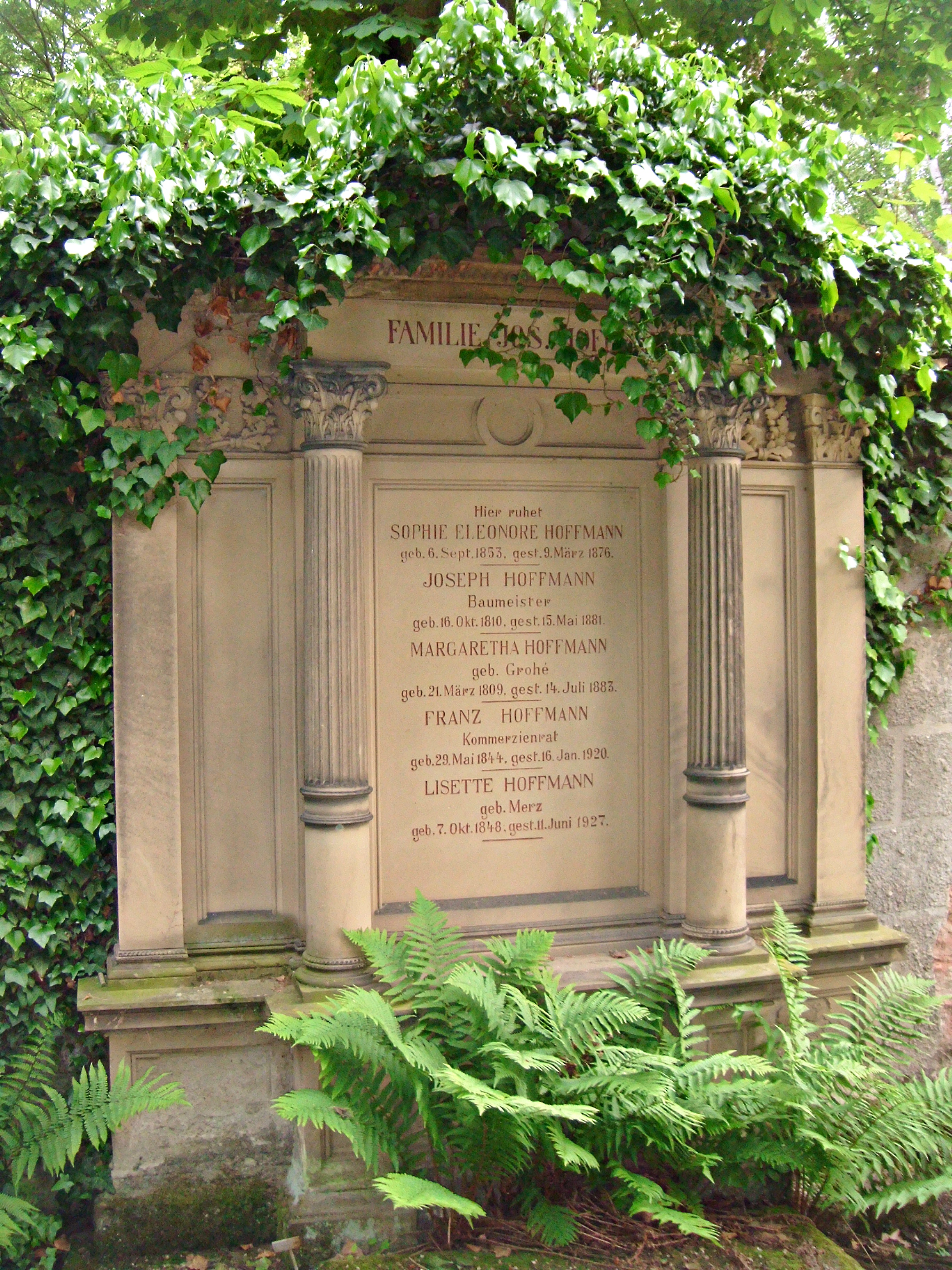 Joseph Hoffmann (1810-1881), Baumeister in Ludwigshafen am Rhein, sowie sein Sohn Franz Hoffmann (1844-1920), Kommerzienrat, Grabmal, Hauptfriedhof Ludwigshafen am Rhein